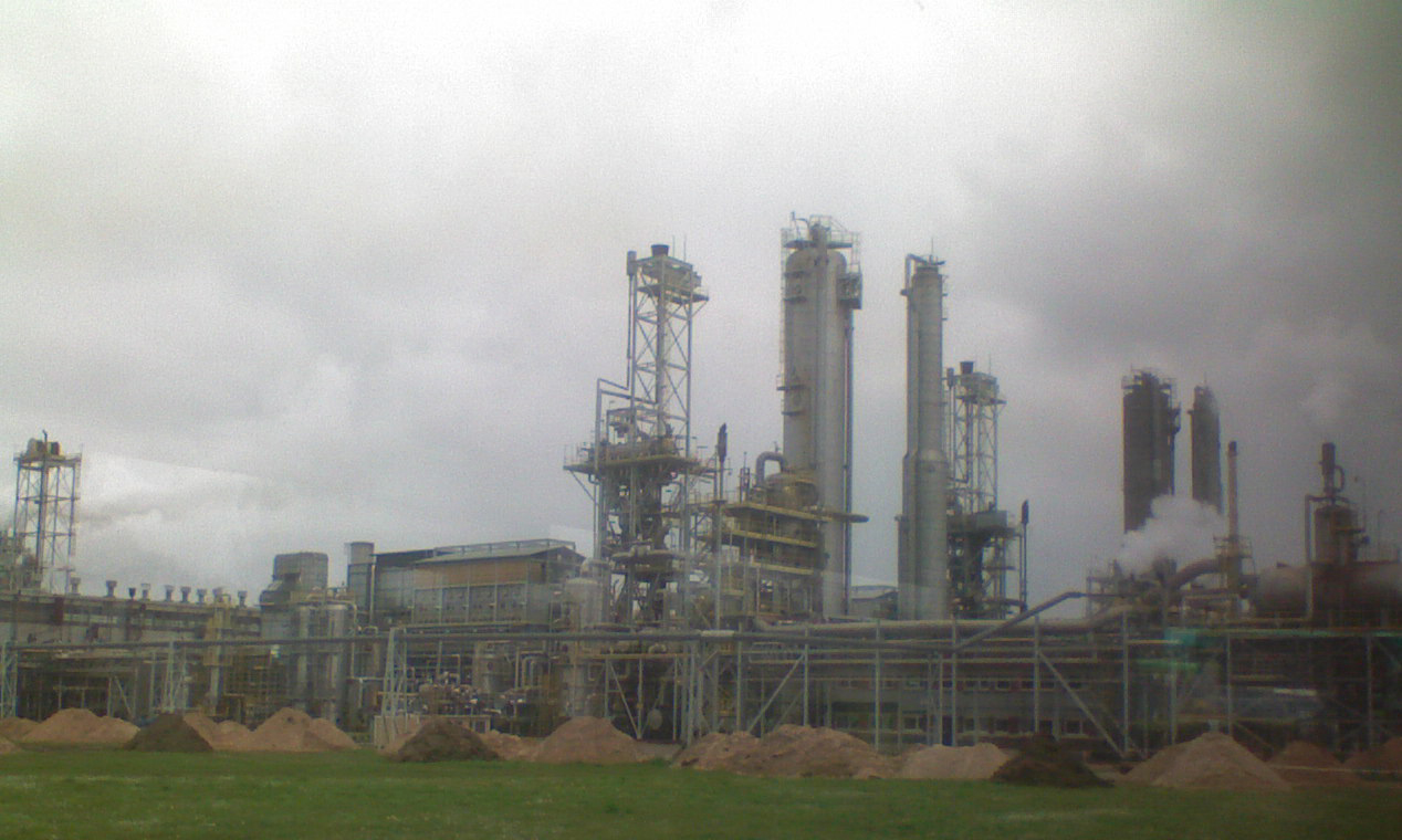 Fragment instalacji produkcyjnych Anwilu we Włocławku